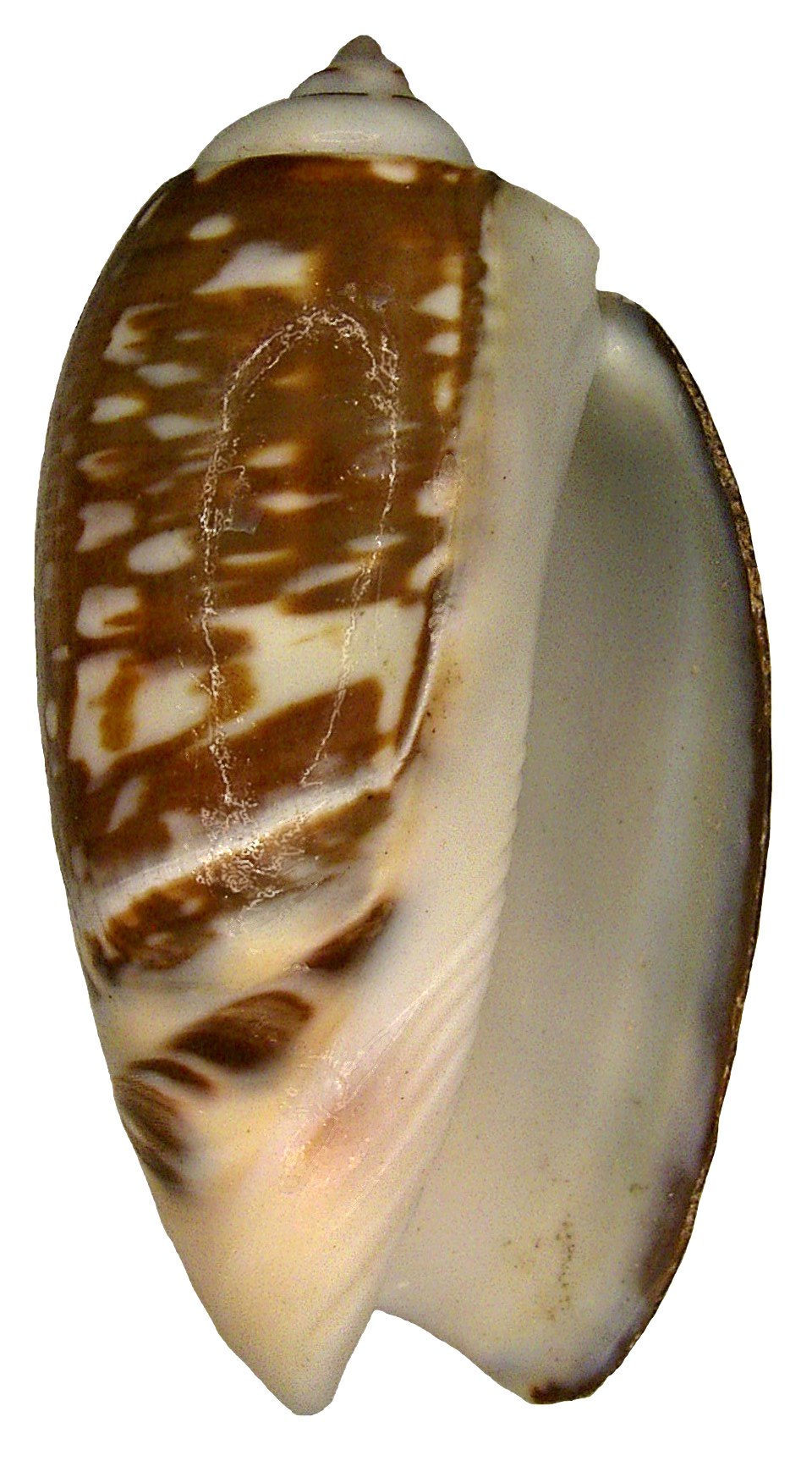 Familie: Olividae Groesse: 50-70 mm Verbreitung: Indo-Pazifik (Südindien und Sri Lanka) Fundort: Sri Lanka leg.det. U.Schmidt, 1980 Photo: U.Schmidt, 2008